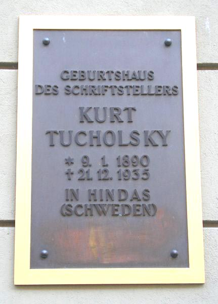 Tafel am Geburtshaus von Kurt Tucholsky, Berlin-Moabit, Lübecker Straße 13 Selbst fotografiert, 4.9.05